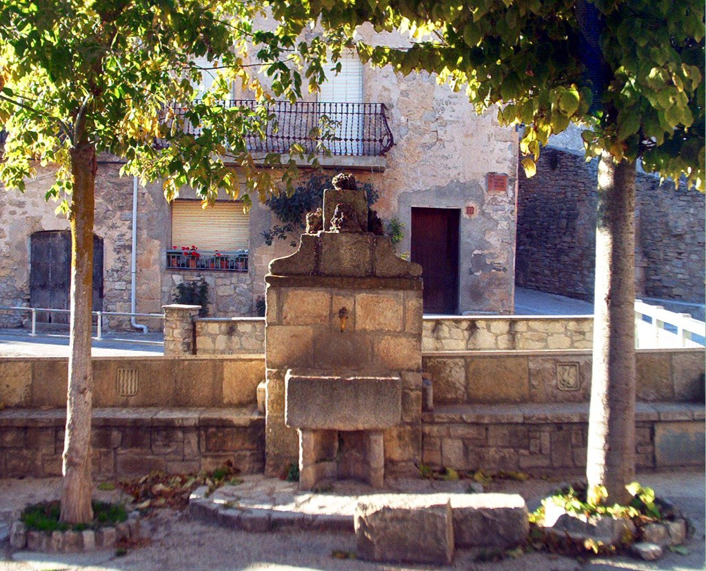 Molts pobles conserven places amb fonts públiques que encara tenen to un aire de finals del segle XIX, aquesta és la de Conesa, a la Conca de Barberà.